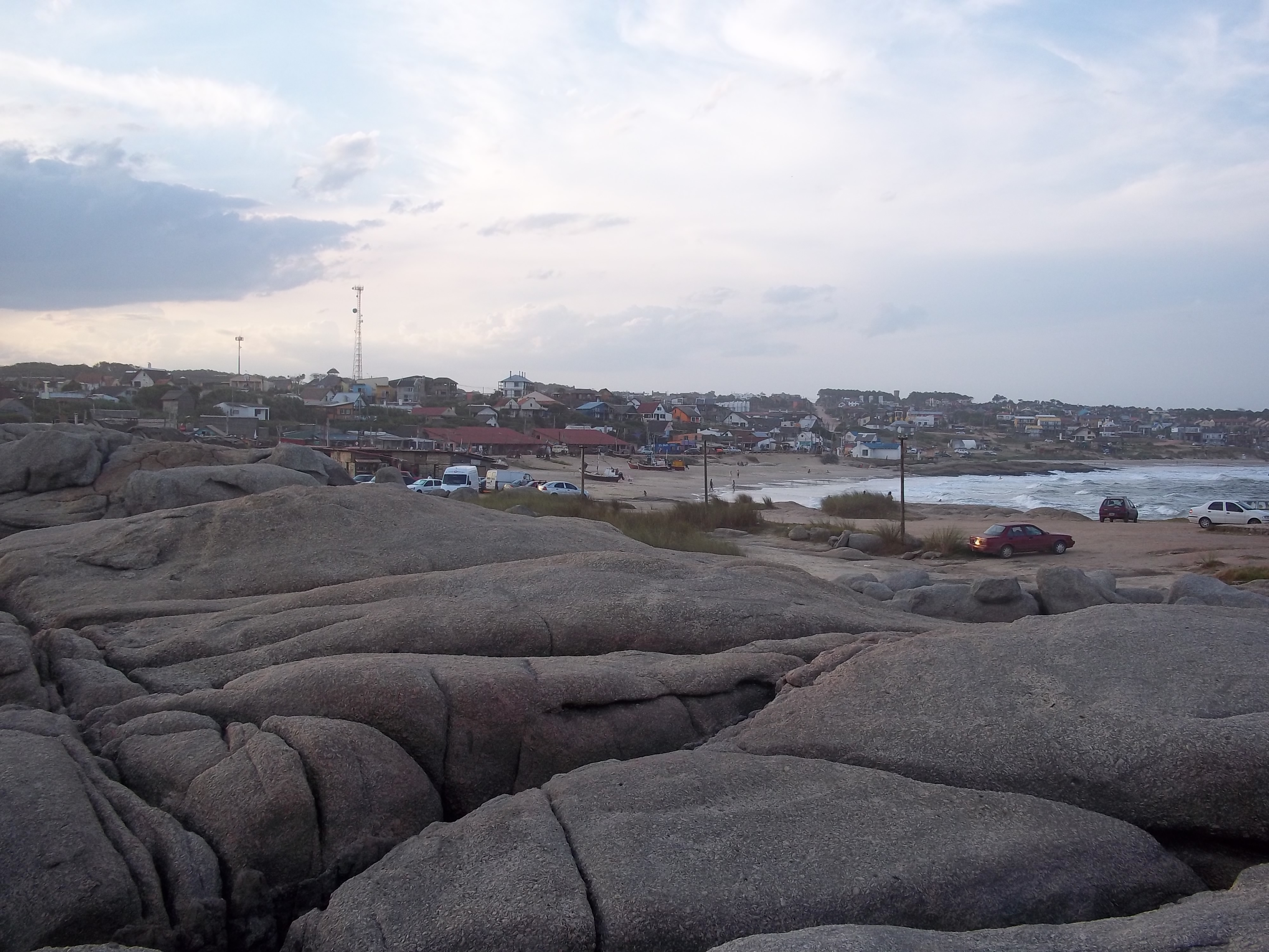 Playa de los Pescadores desde las rocas (Punta del Diablo, Rocha)